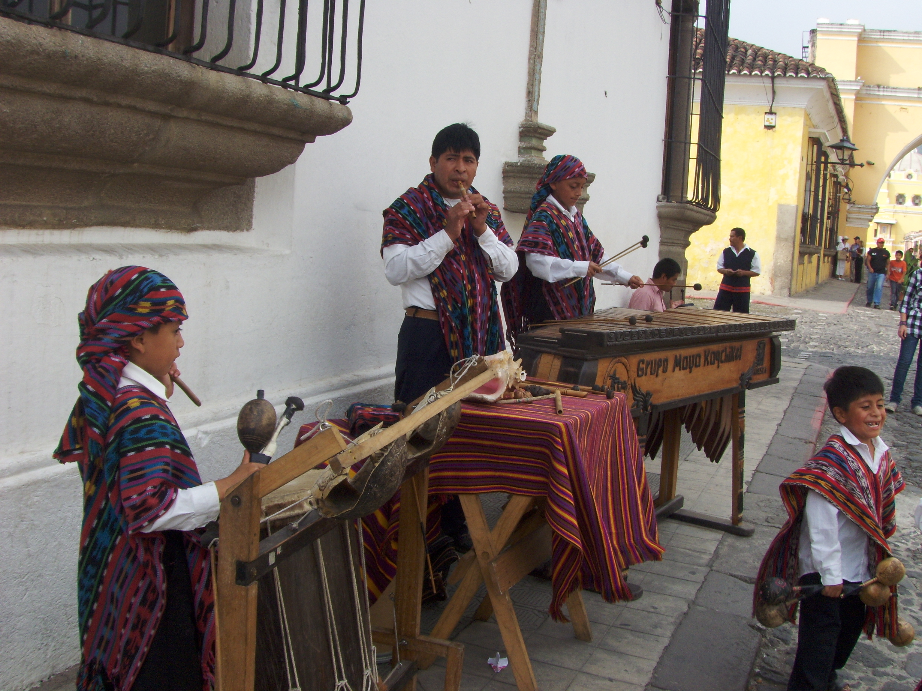 Tocadores de marimba en las calles de Antigua Guatemala